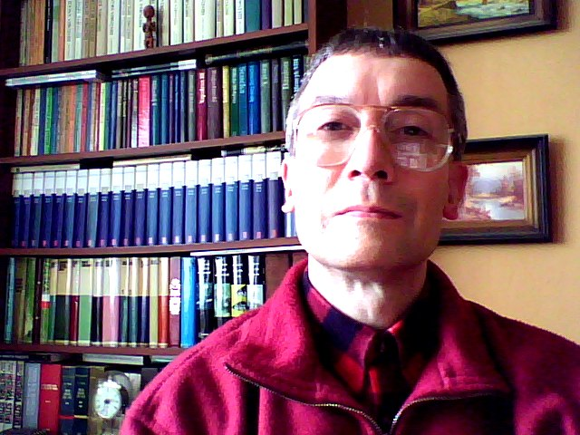 Marek Żukow-Karczewski w swoim gabinecie (2015)